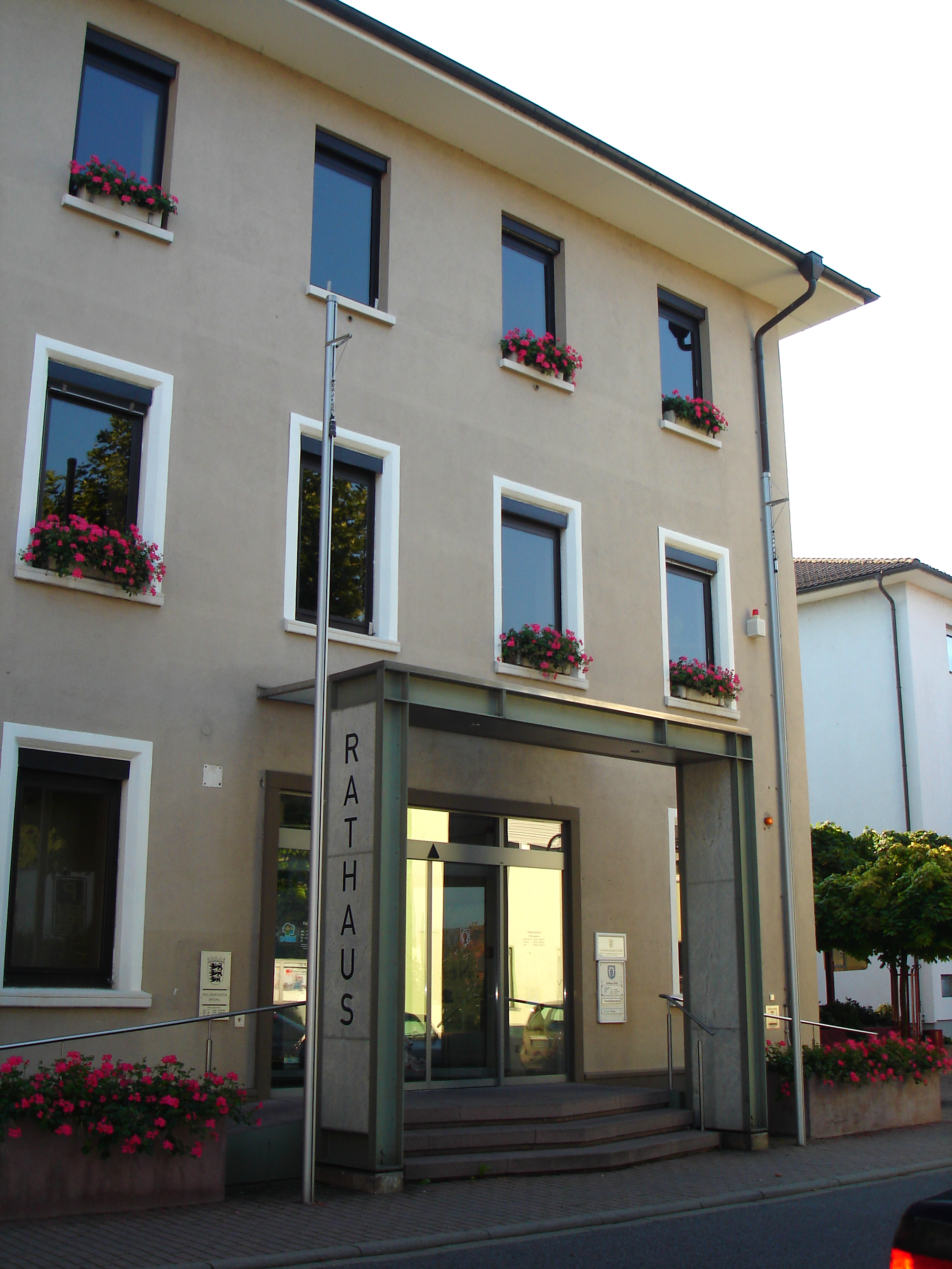 Deutschland: Rathaus der Gemeinde Brühl (Baden)